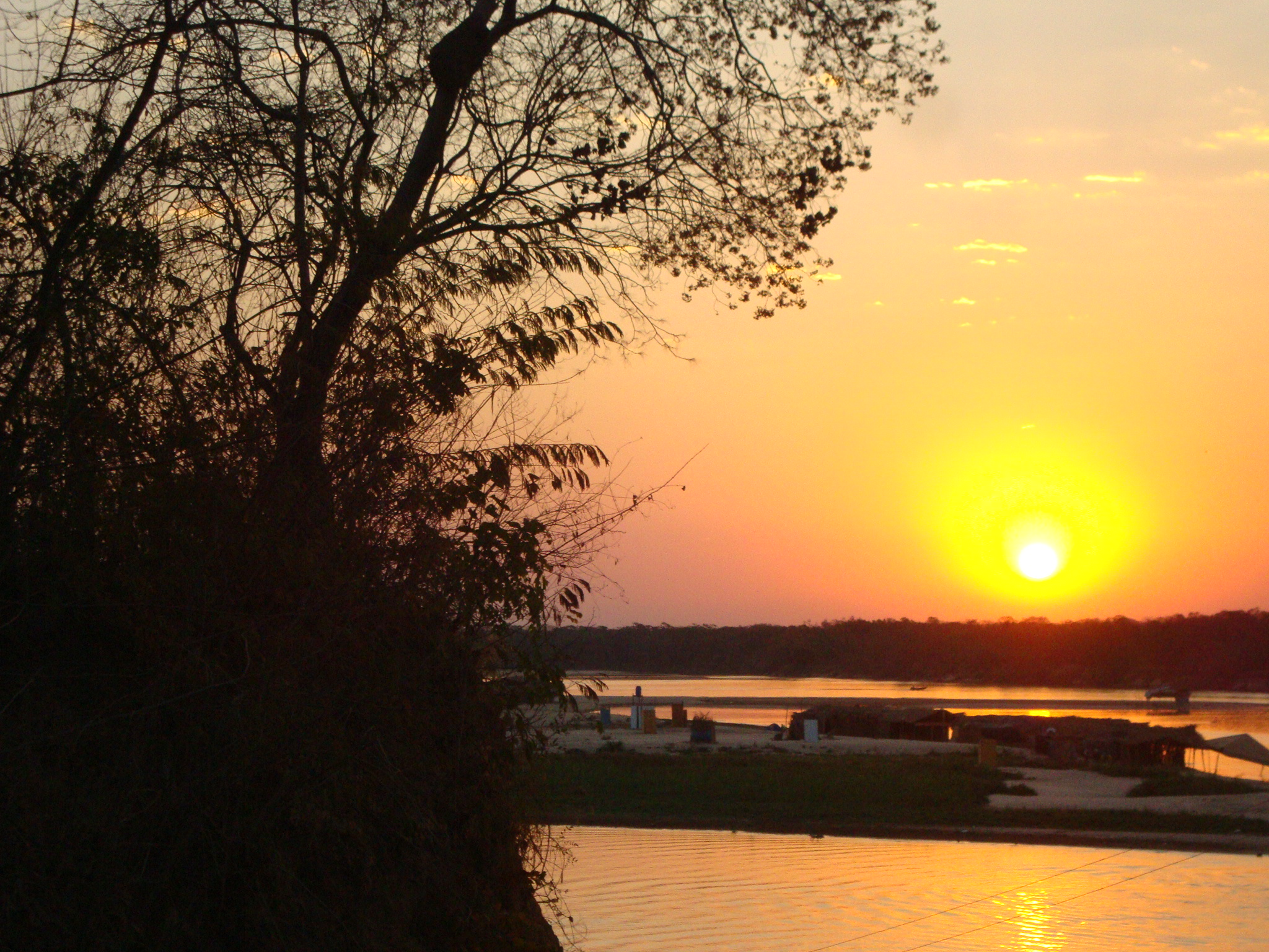 Foto tirada em uma tarde de muito amor e paixão pela a vida, iluminada pela beleza do rio Araguaia .